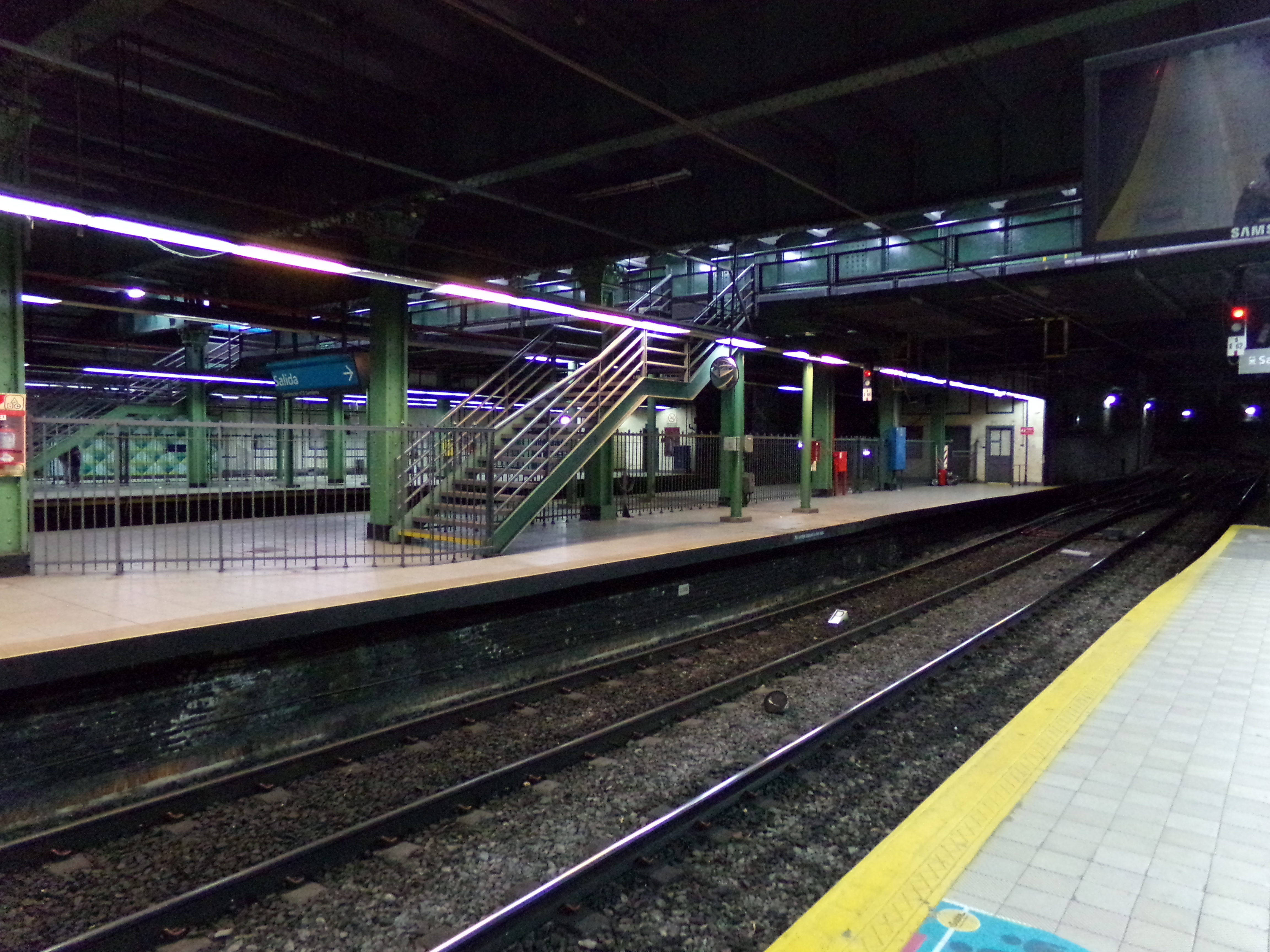 Plaza Miserere, línea A